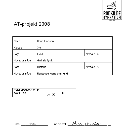 Synopsisforside til almen studieforberedelse. Brugt på STX.